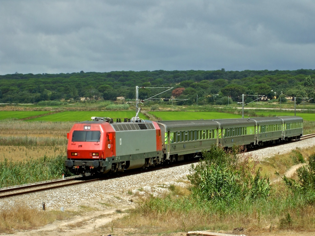 Tipo: Comboio Intercidades 570 [Lisboa • Oriente - Faro] Local: Alcácer do Sal [Linha do Sul, PK 73] Data e hora: 25 de Julho de 2008 [11h46] Material: Locomotiva 5601 Entroncamento + 4 carruagens Sorefame Renovadas